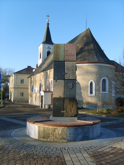 Kirche und Europabrunnen Oberwaltersdorf